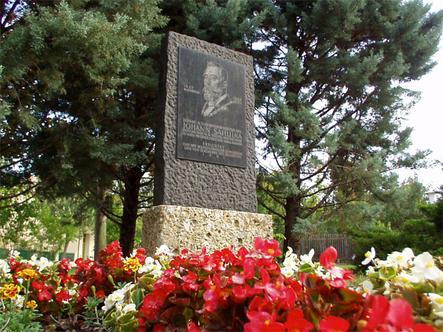 Sahulka Memorial